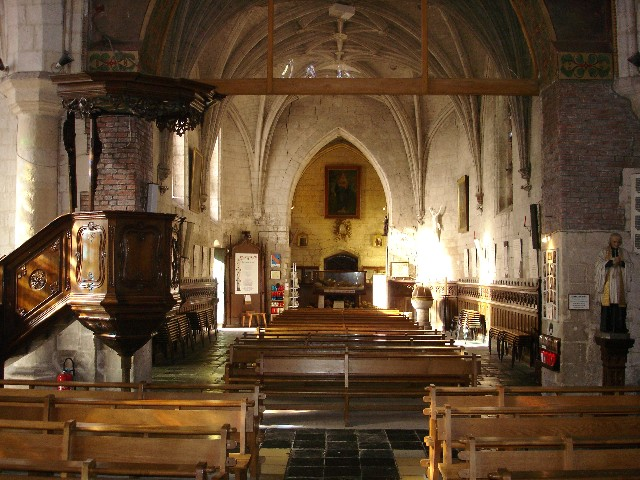 L'intérieur de l'église d'Amettes